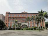 中壢高級中學教學大樓。